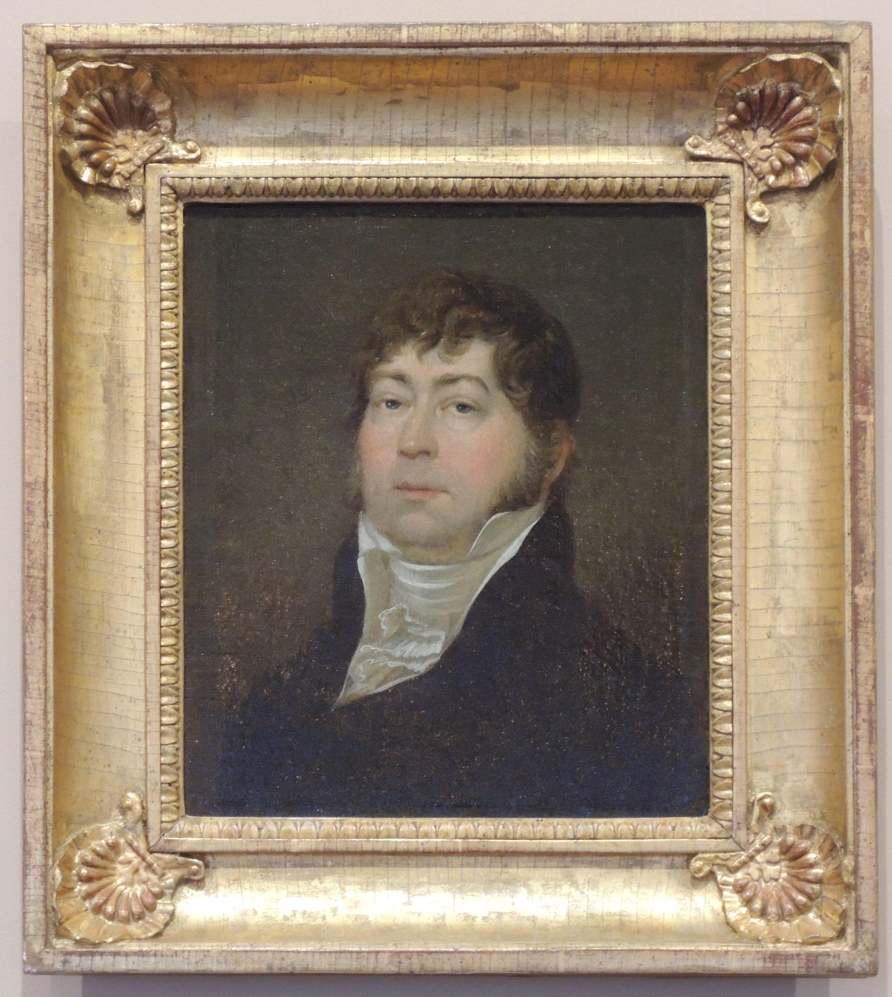 Портрет В.Л. Пушкина. Неизвестный художник. Холст, масло. 1810-е